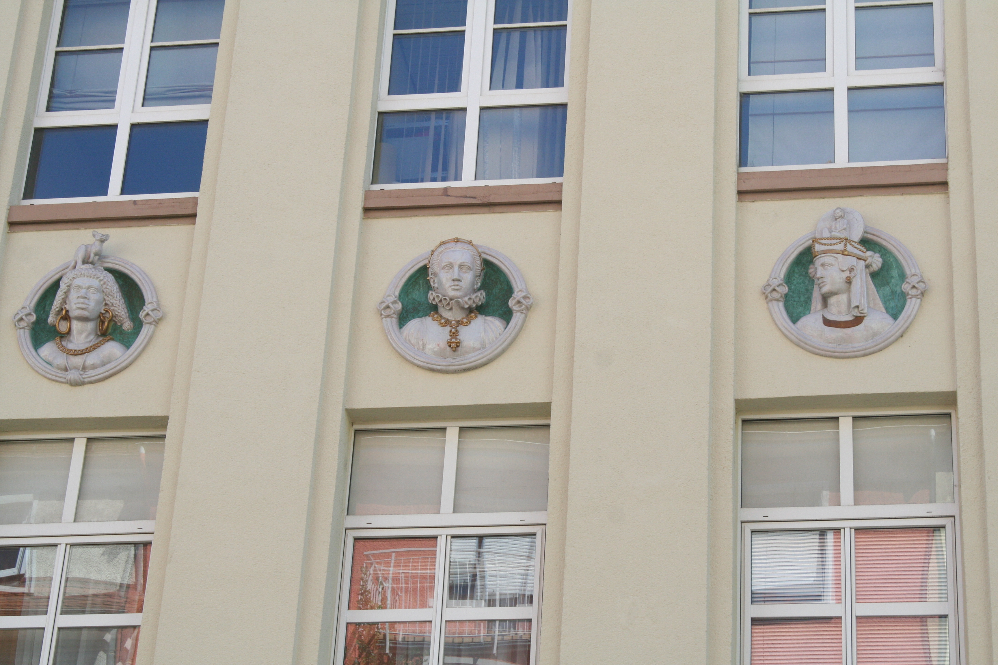 Pforzheim